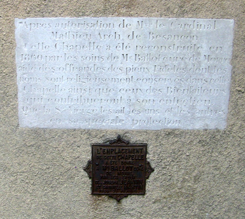 Plaque située à l'exterieur de Notre-Dame des Buis de Besançon (Doubs, France).